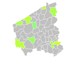 Locatie van Finse pistes in de Belgische provincie West-Vlaanderen (met kleurschakering voor afstandsgradering). Indien er meerdere pistes aanwezig zijn wordt de langste weergegeven.